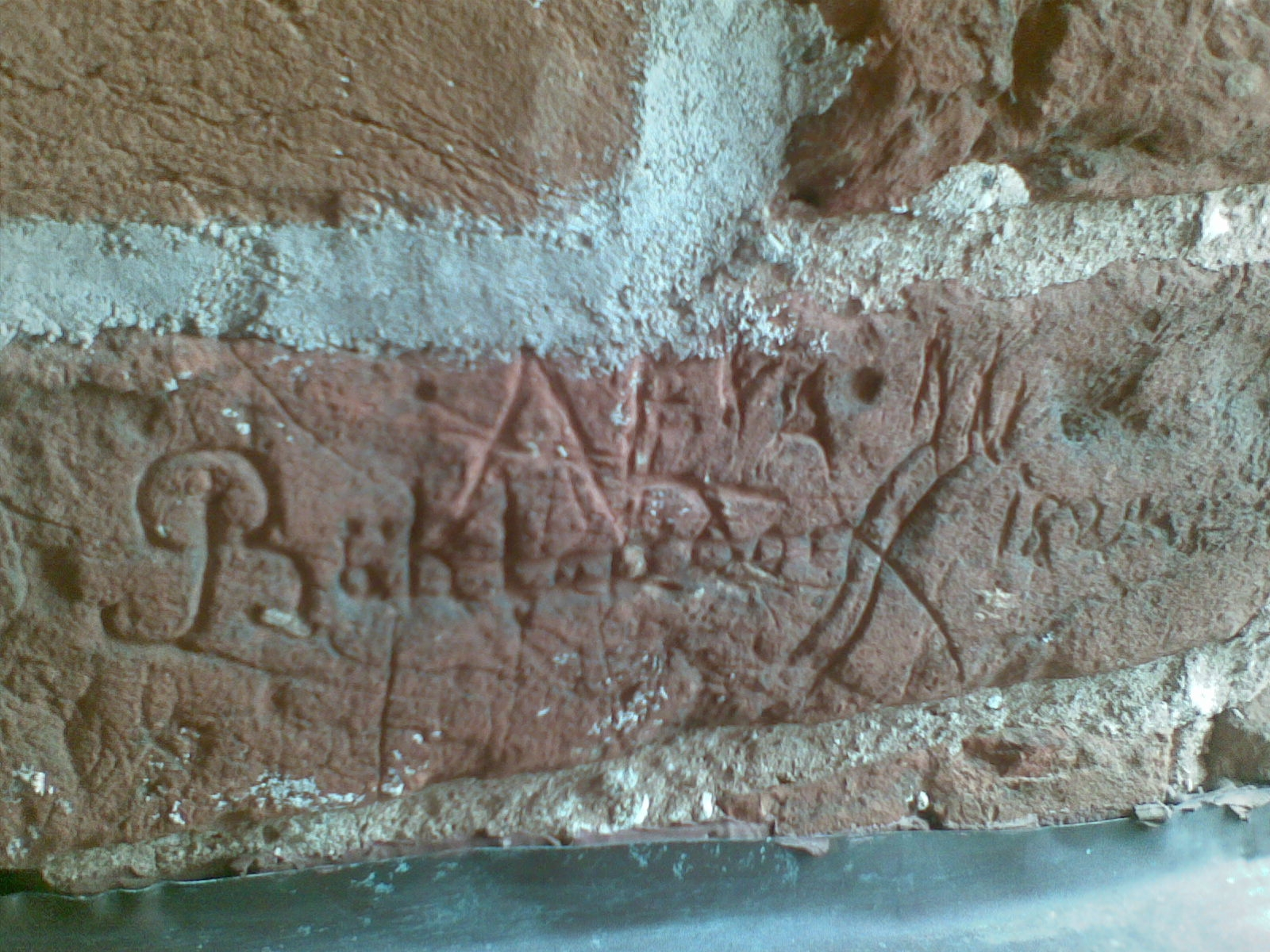 Grafiti Tartu toomkiriku lõunatornis (1828).